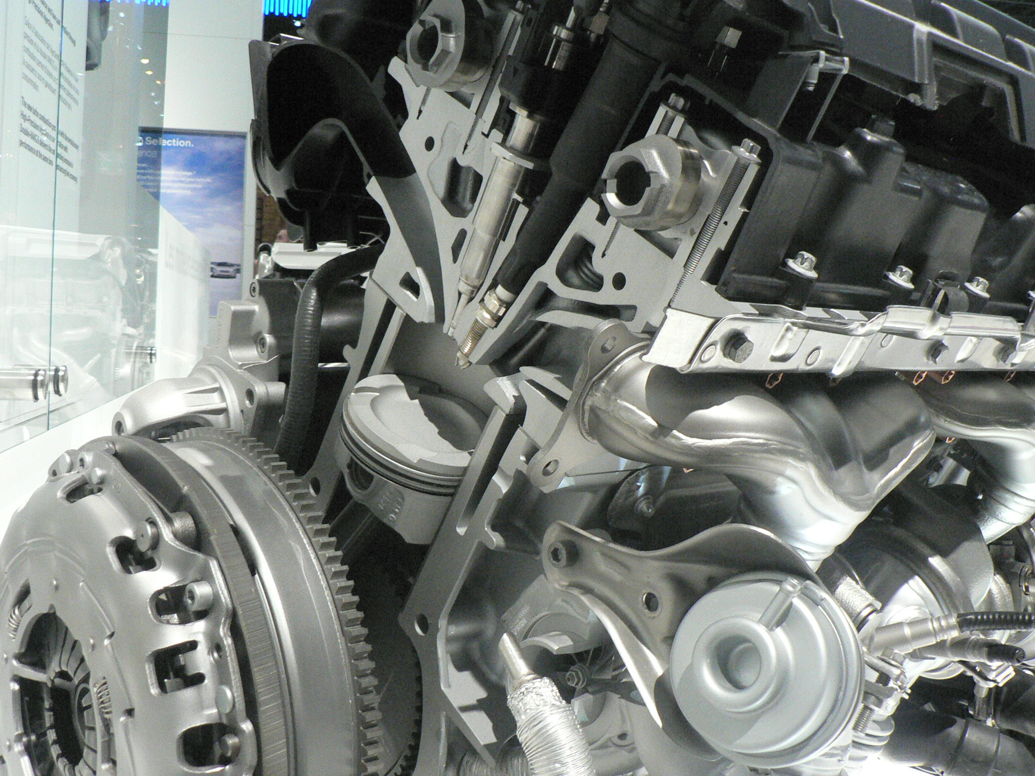 Mondial de l'automobile, Paris 2006